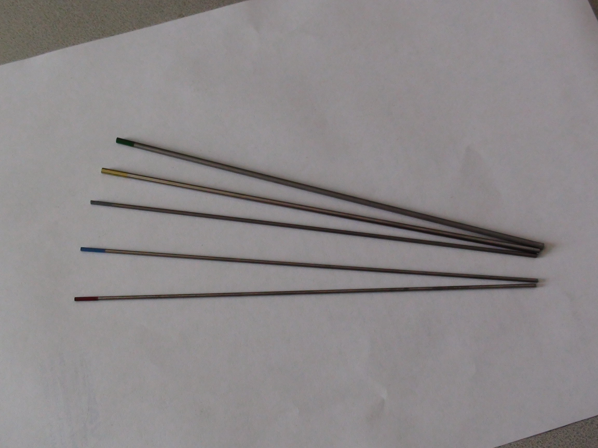 Volframove elektrode.